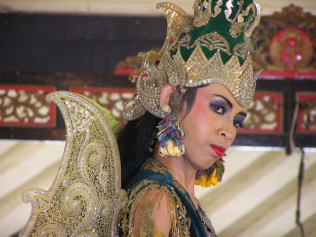 A dancer during performance. Photo taken in Yogyakarta, Indonesia.